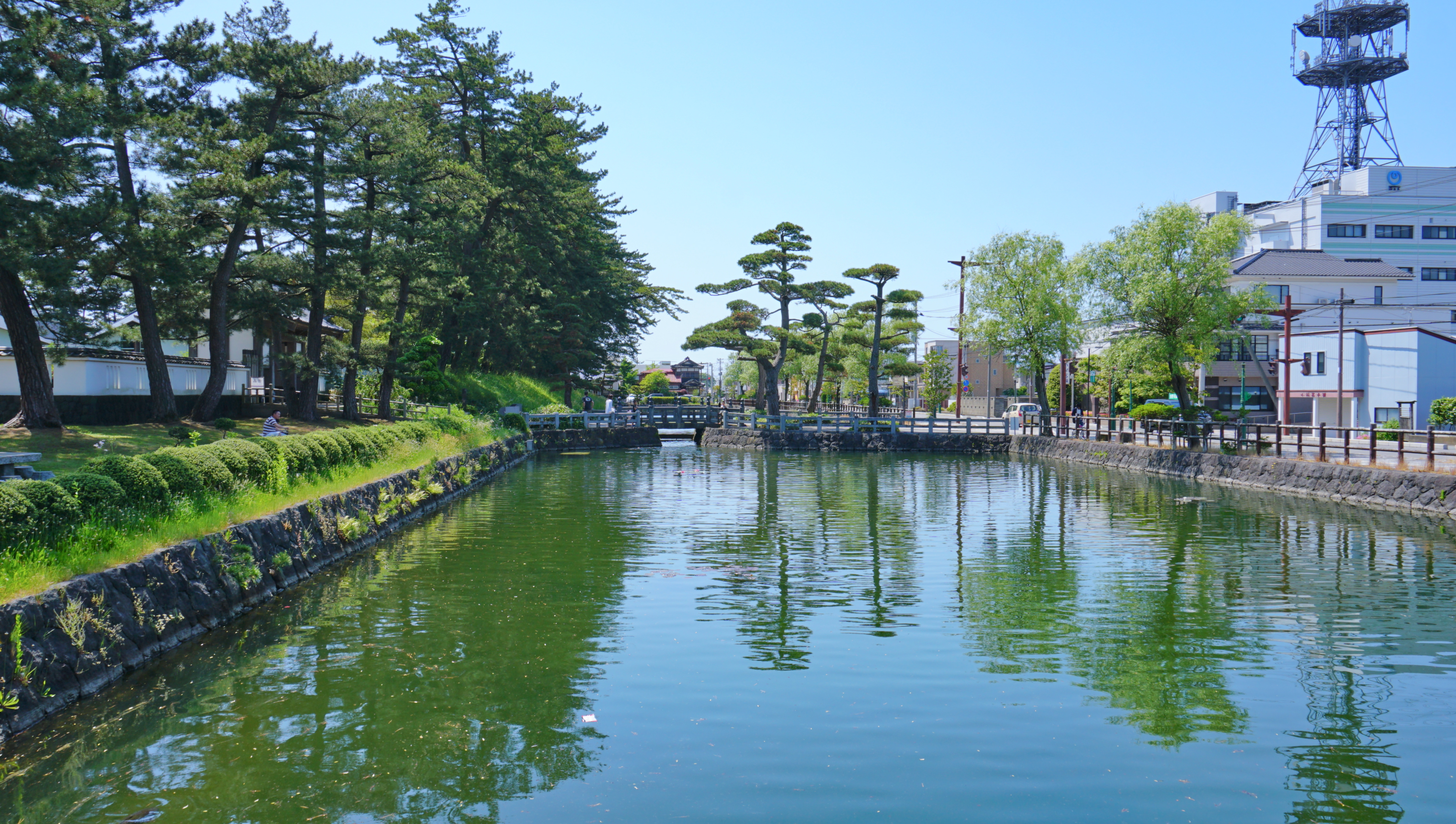 本荘公園（旧本荘城）の水堀（秋田県由利本荘市）